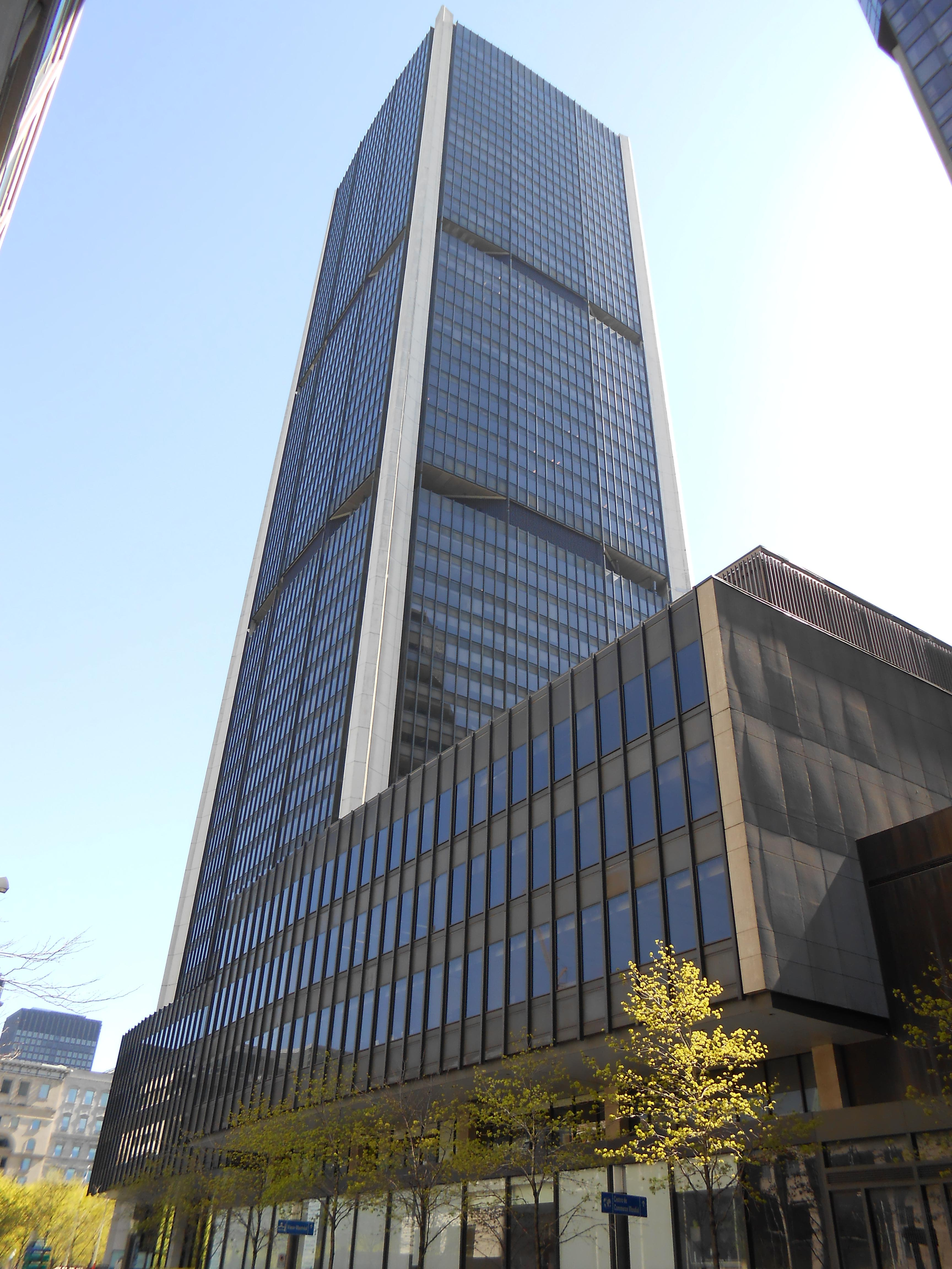 Tour de la Bourse, Montréal